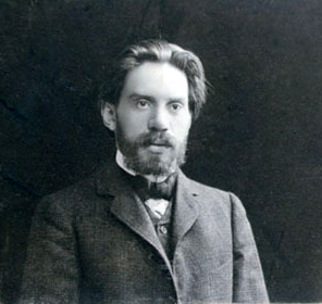 Степан Григорьевич Писахов (1873-1960) - русский художник и писатель